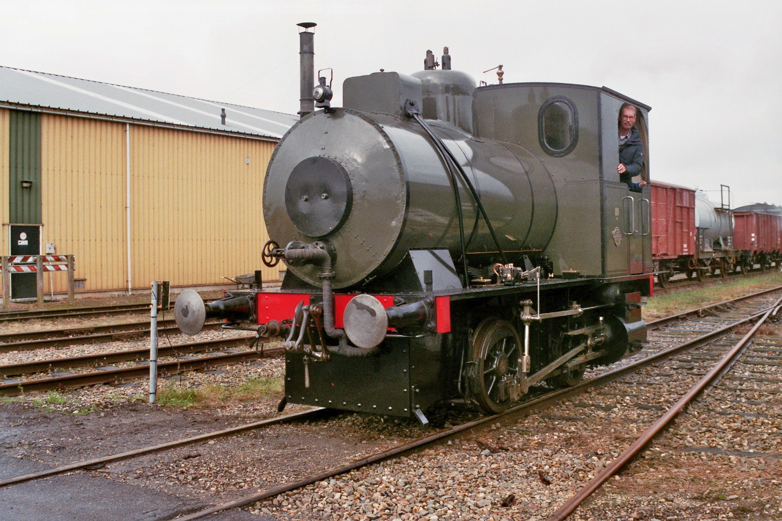 Vuurloze locomotief 6326 in Stadskanaal. De loc is gebouwd door O&K in 1913 en sinds 2017 bij de STAR. Camera Canon Eos 3000. Film Fujifilm Superia X-tra 400 ISO